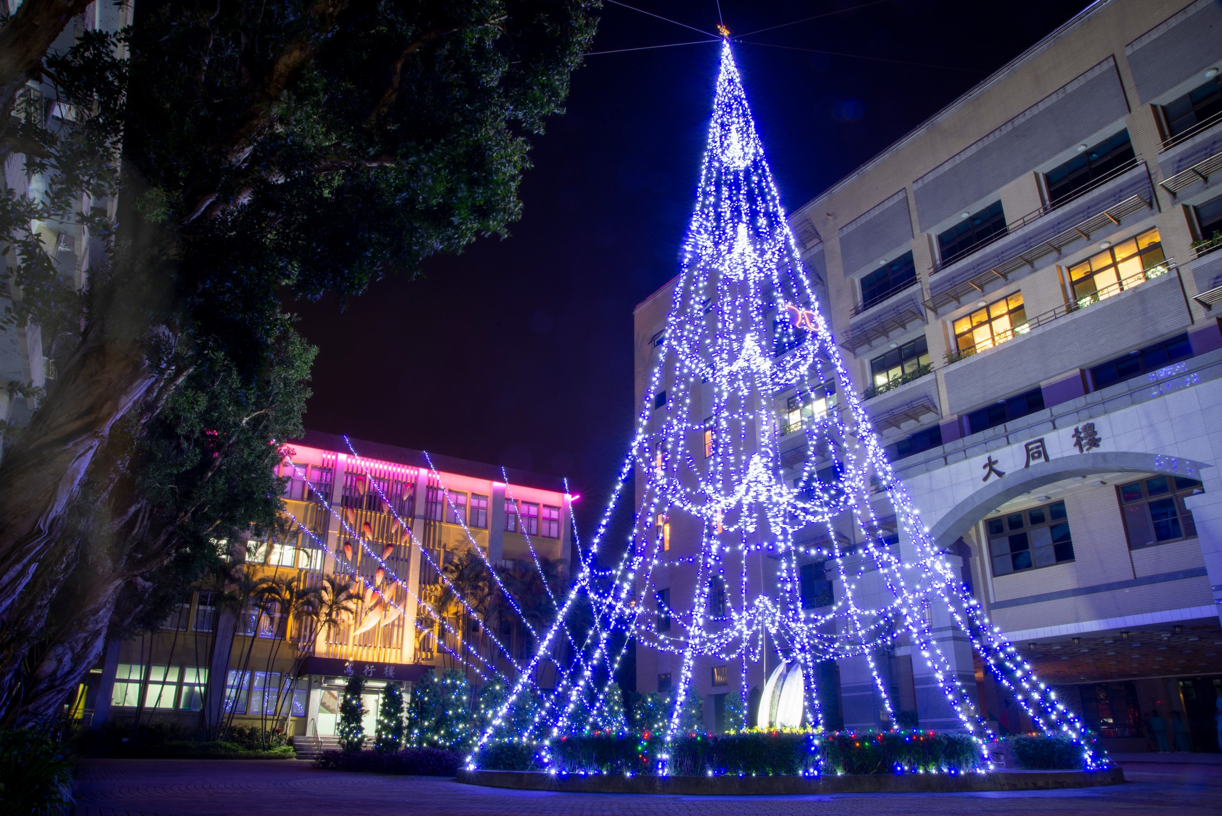 中文（台灣）: 松山工農校景